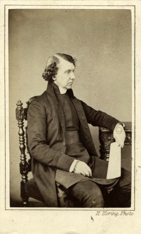 Photograph by Henry Hering